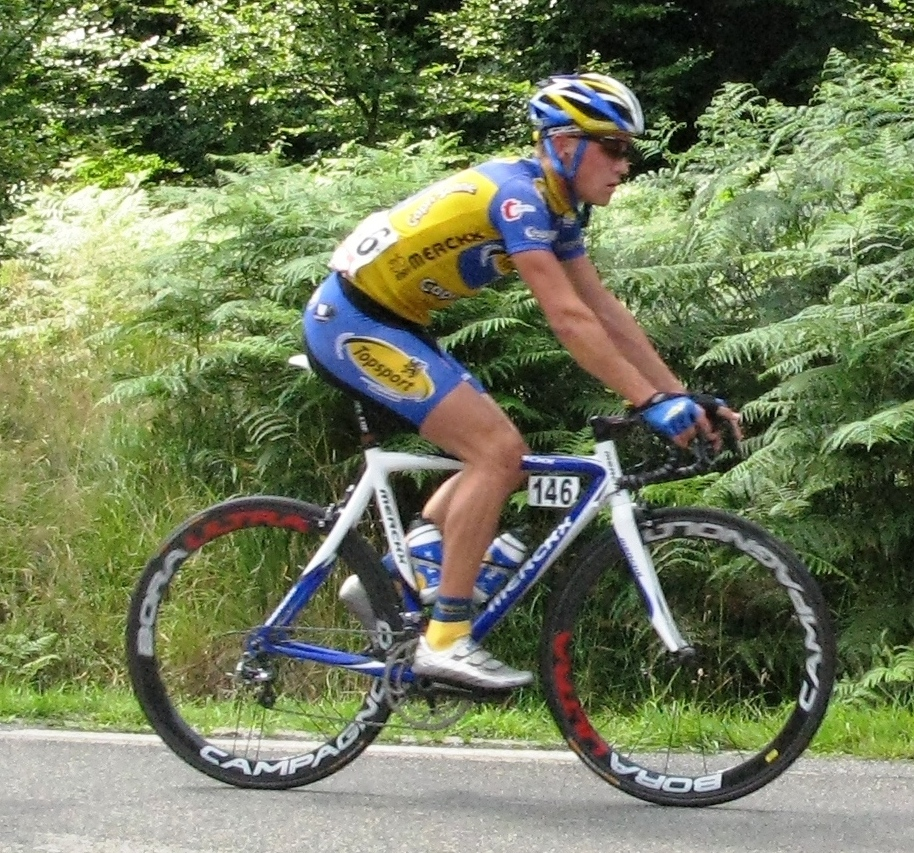 De Serge Pauwels an der Côte de Lahaut, op der 4. Etapp vum Tour de Wallonie 2008. Pauwels